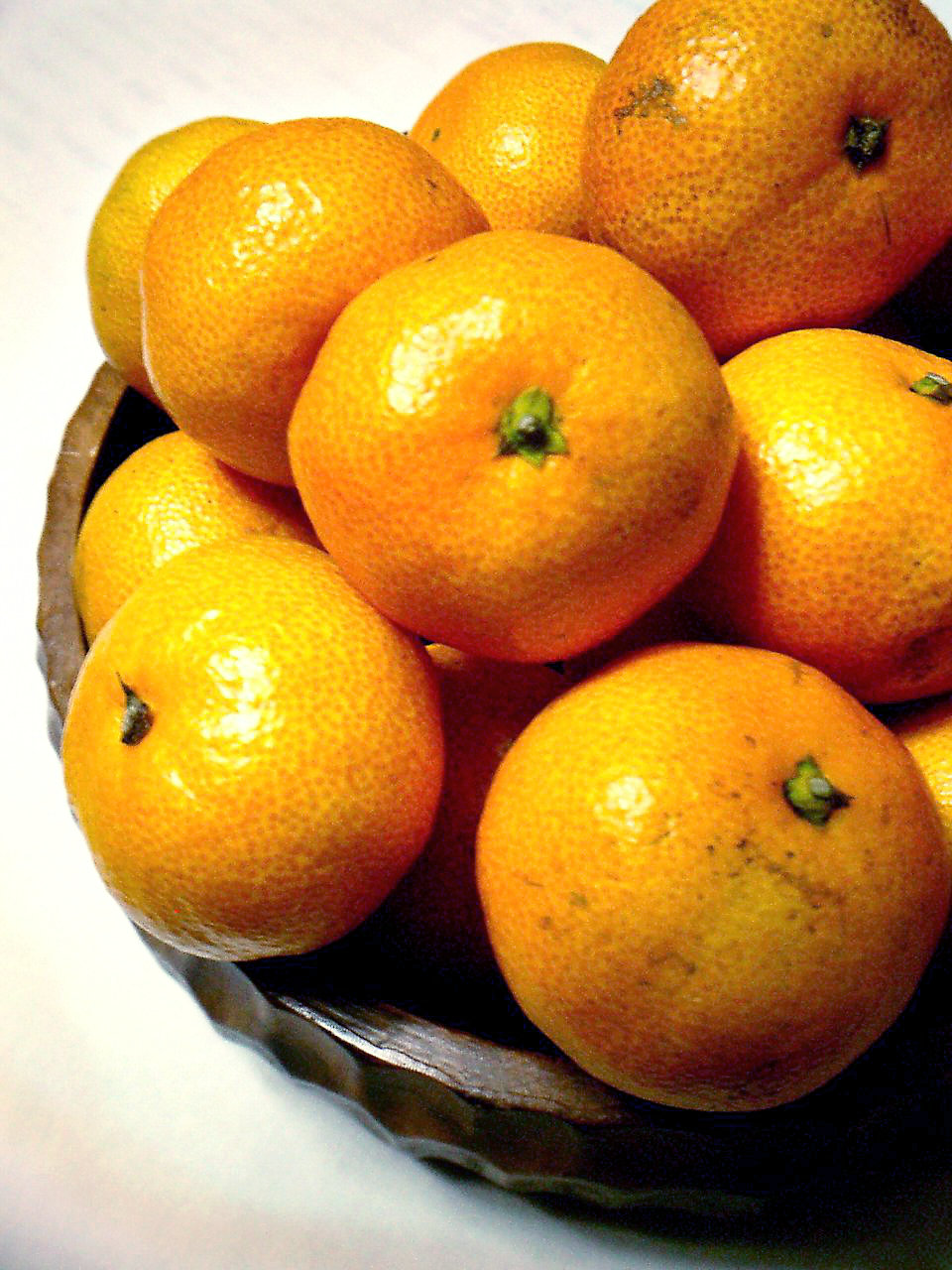 Mikan(unshu-mikan) (Citrus unshiu)